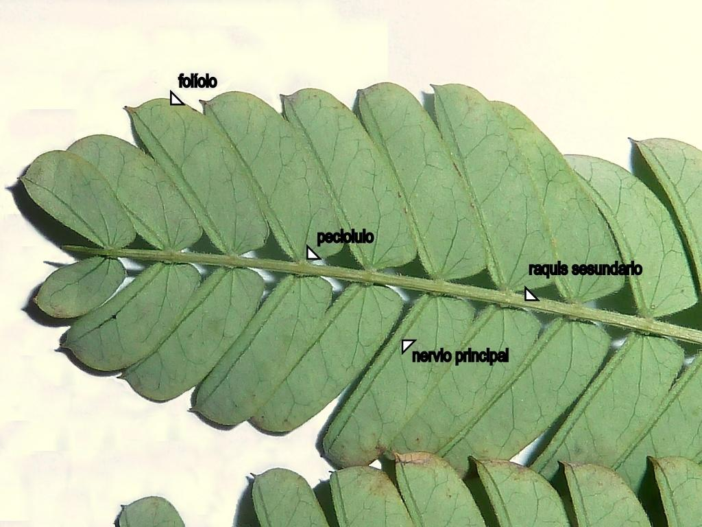 Albizia julibrissin (Acacia de Constantinopla) : pinna hojal con sus componentes - Ornamental, Plaza de Felipe II (Madrid, España).